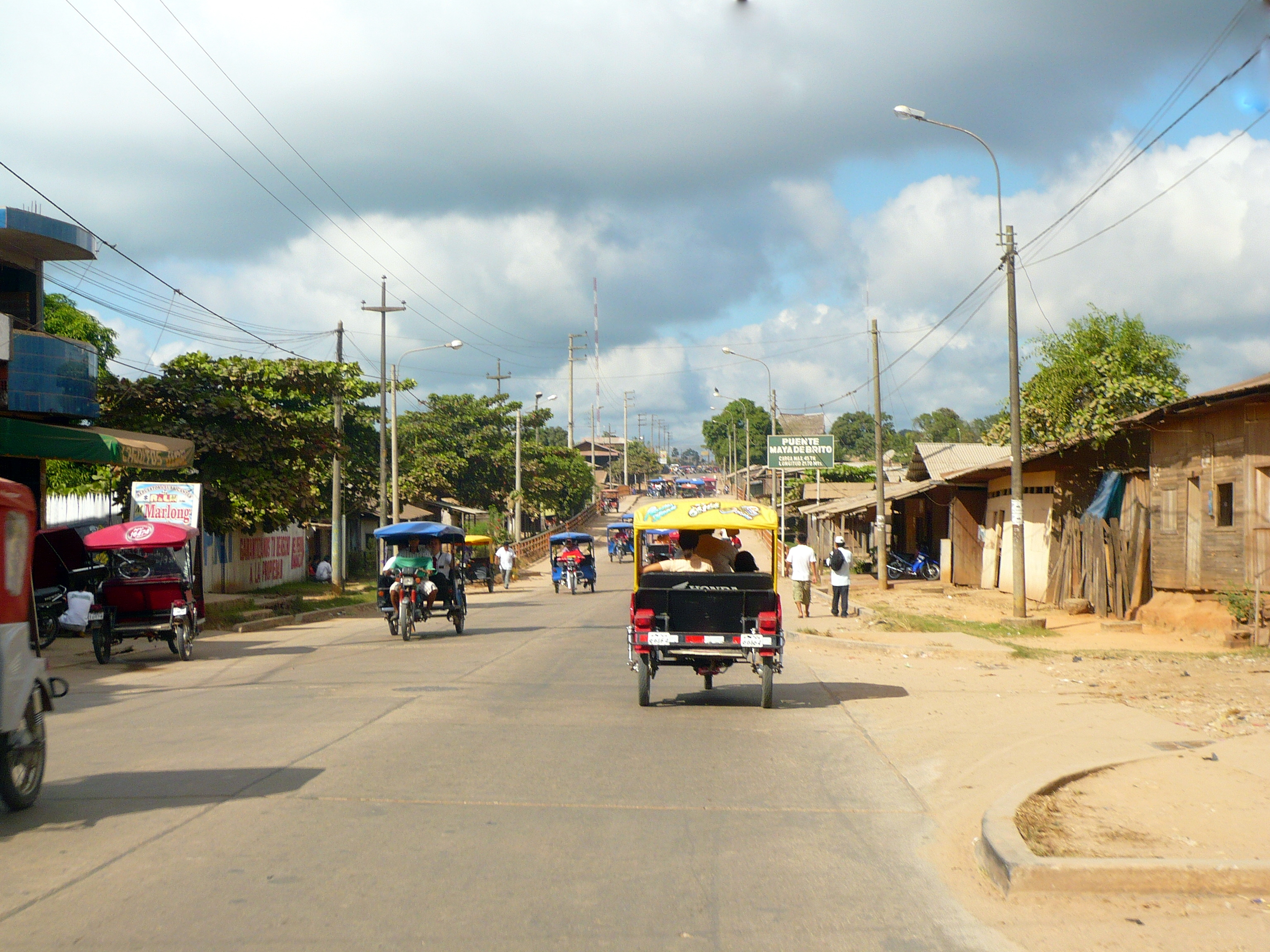 El Puente Maya de Brito, en la calle del mismo nombre, dividiendo la quebrada de Yumantay. Esto en el distrito de Manantay, ciudad de Pucallpa.